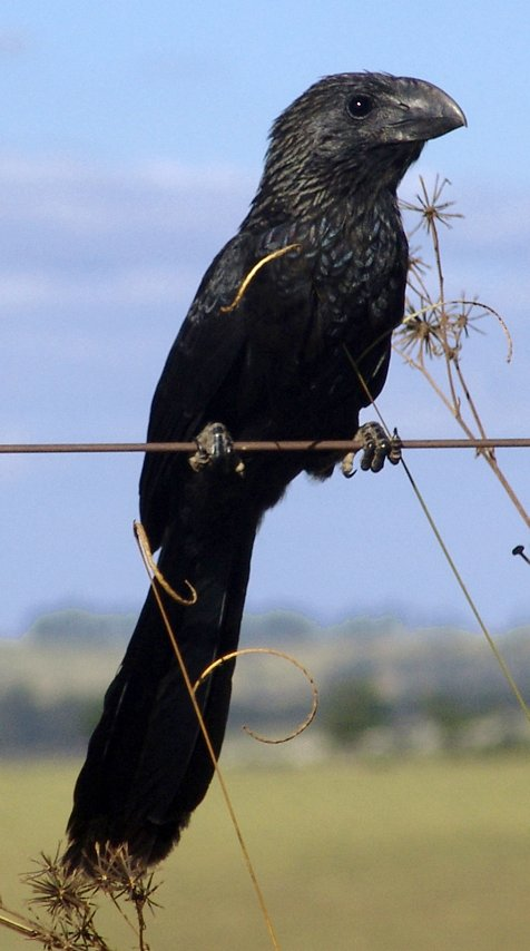 Crotophaga ani, Avaré (Brazil)